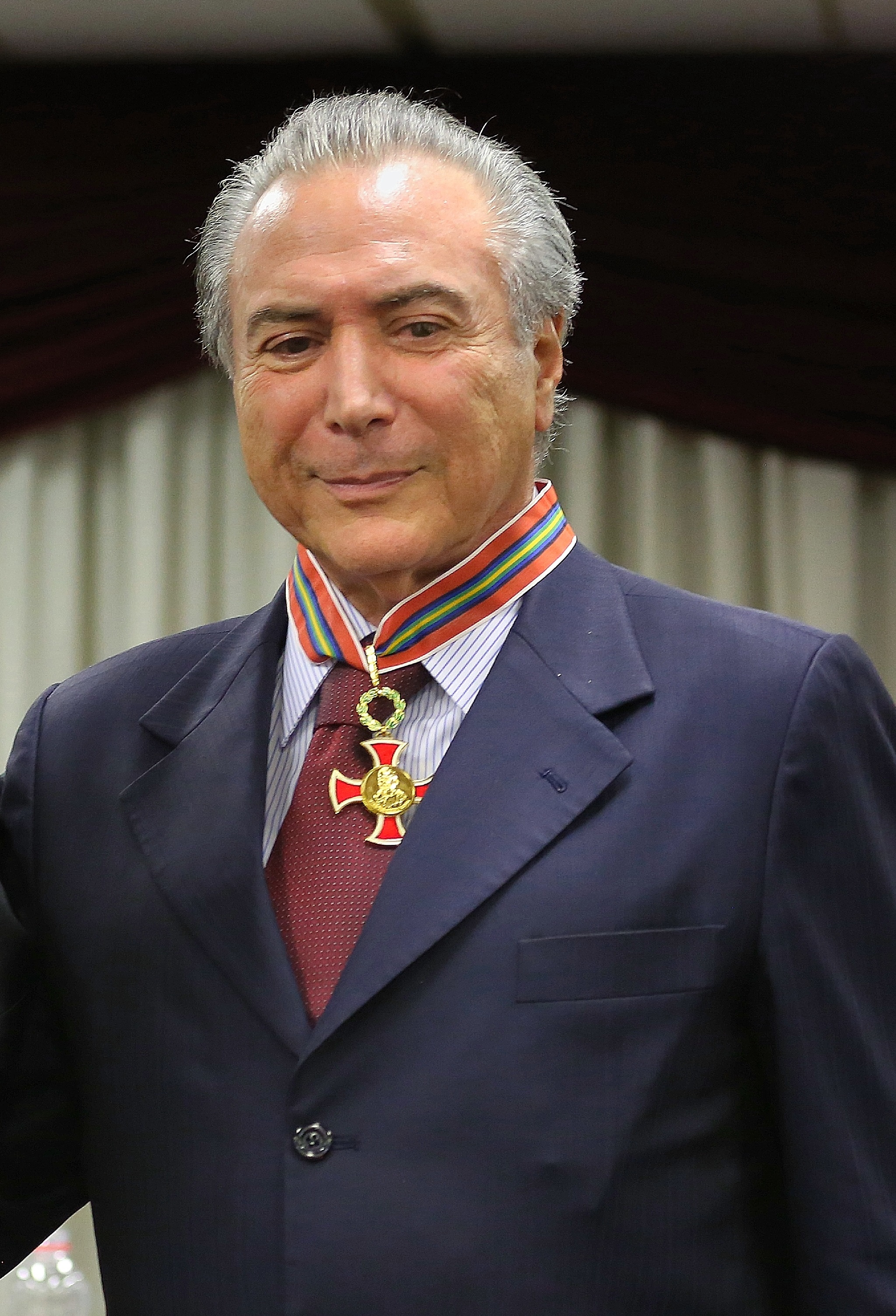 03-10-2013 Vice-presidente Michel Temer recebe colar do mérito judiciário Ministro Pedro Lessa